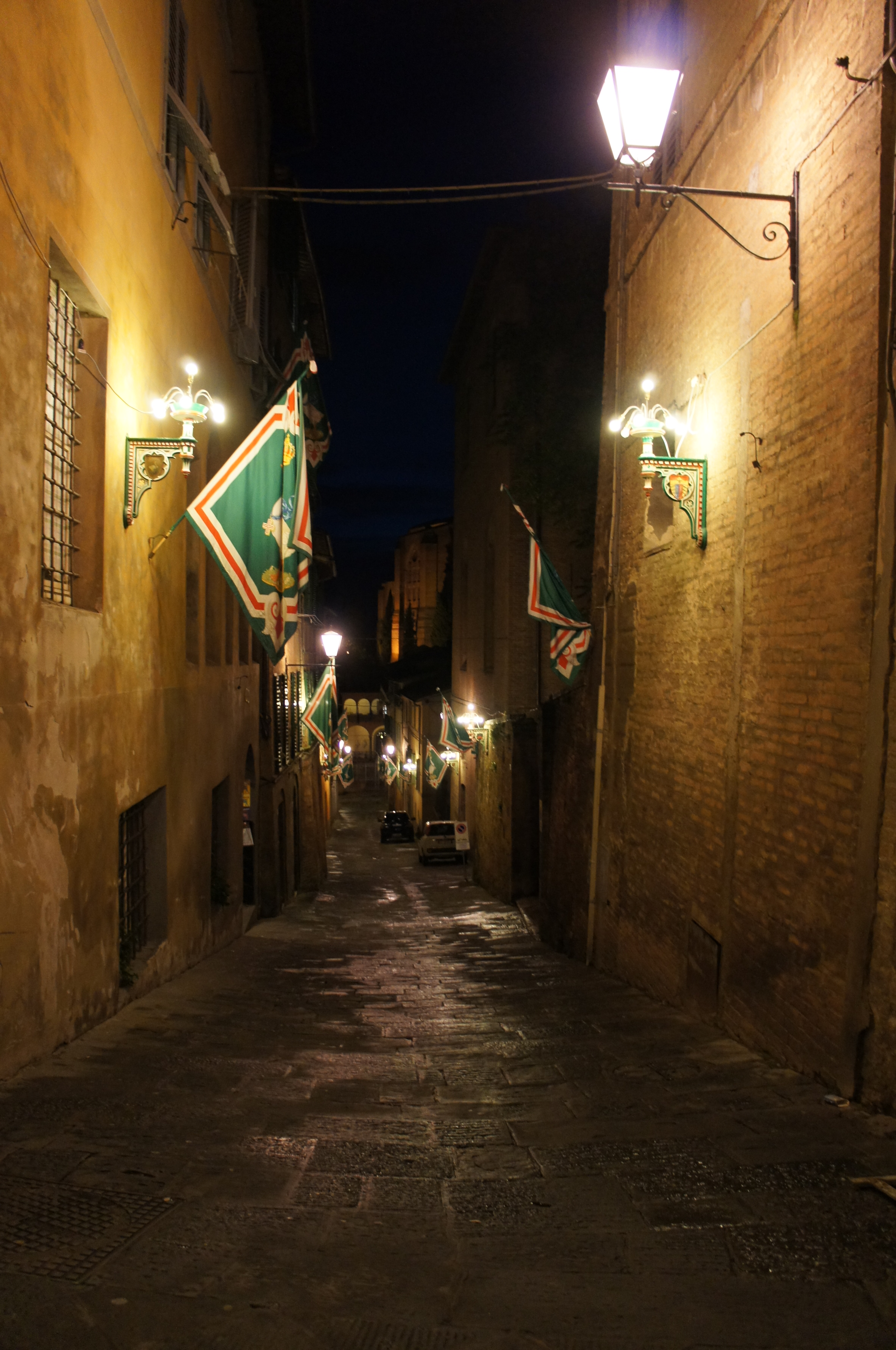 Strada nella contrada dell'Oca, Siena